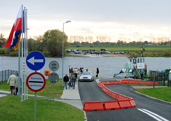 Grenzübergang Gozdowice Polen